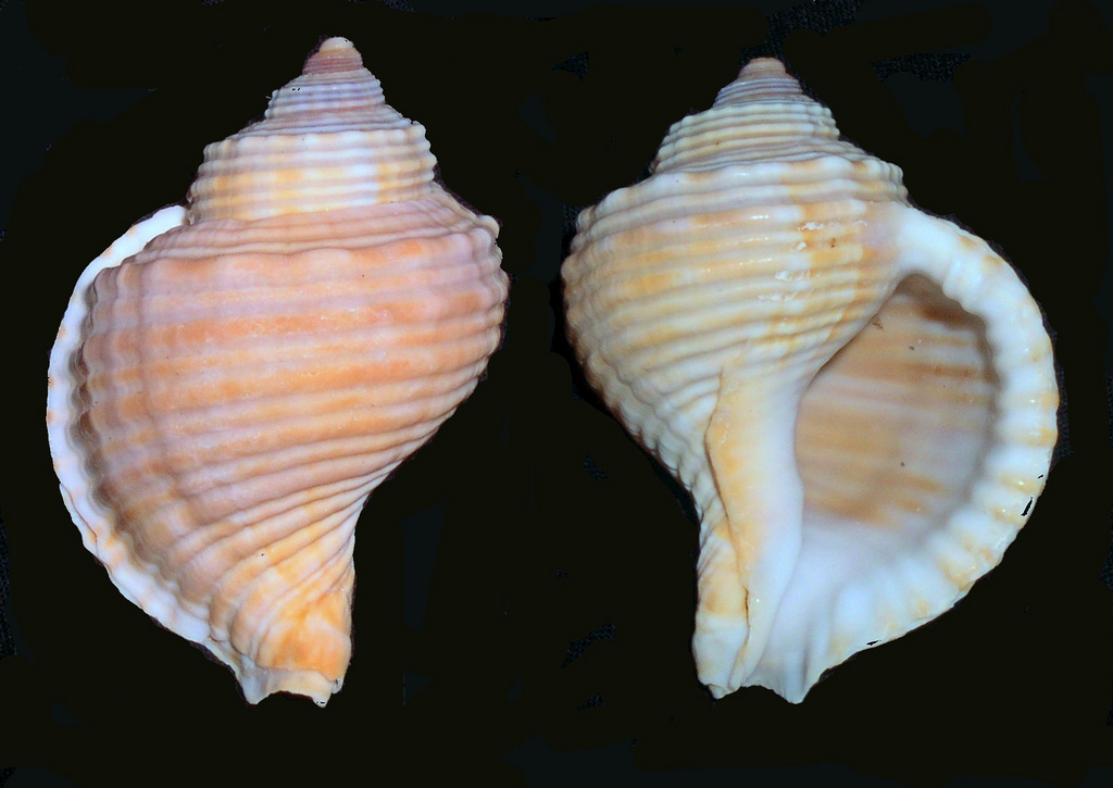 Linatella caudata (synonym : Ranularia caudata)